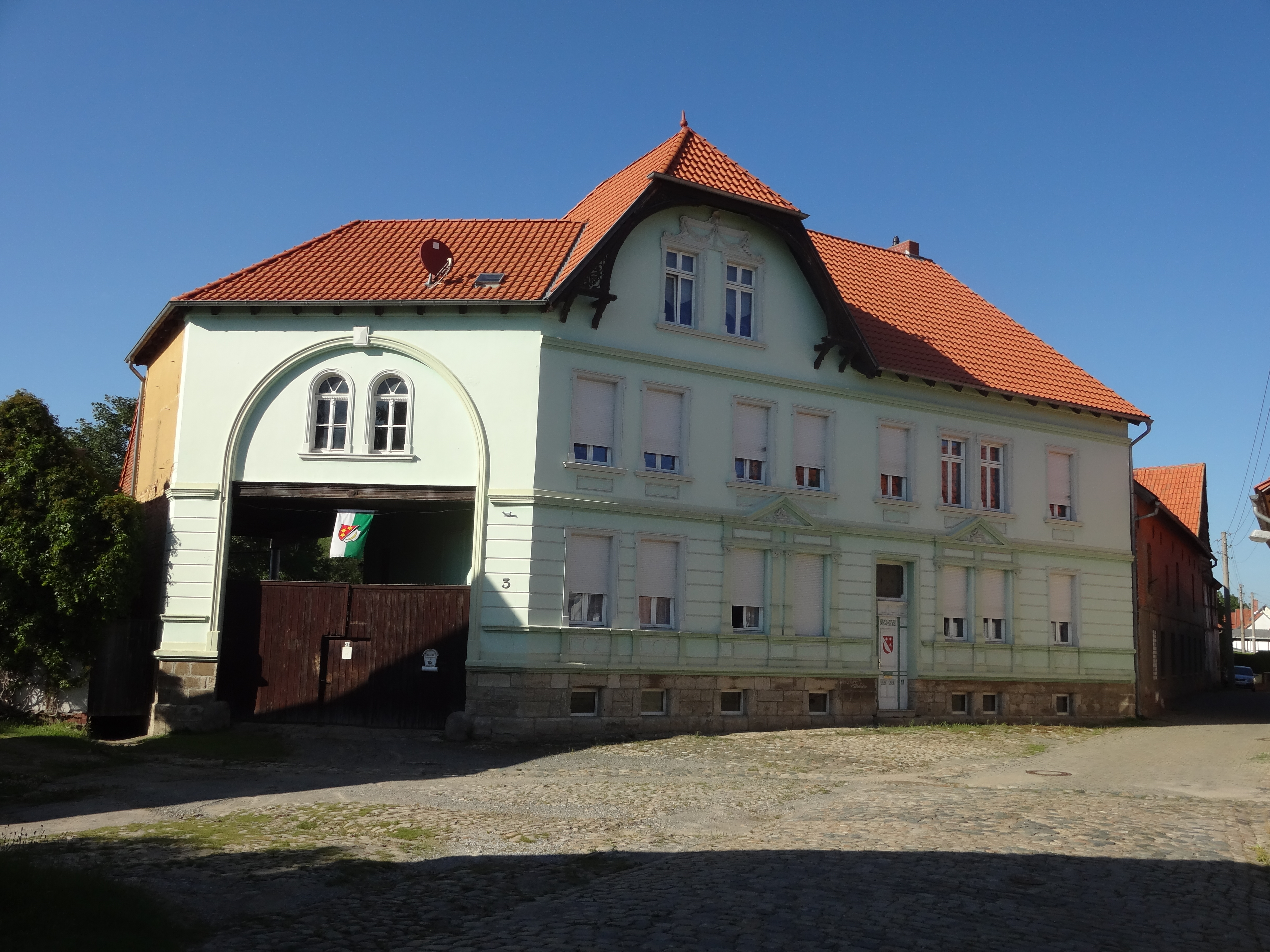 denkmalgeschütztes Bauernhaus in der Lange Straße 3 in Harsleben)